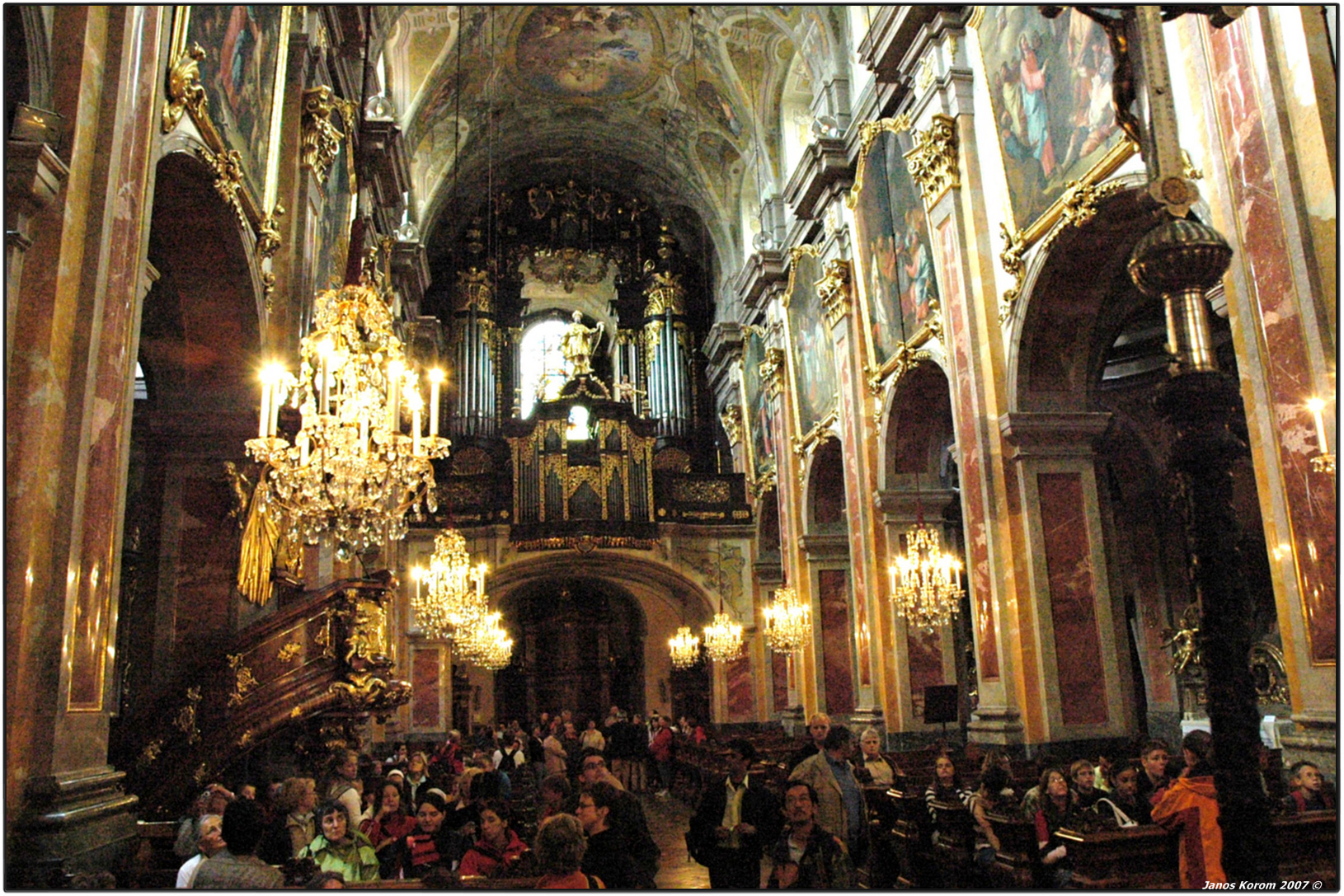 St. Pölten 109 St. Pölten, Lower Austria